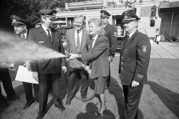 Bonn, 11. September 1990 vor dem Kanzlerbungalow Die Freiwillige Feuerwehr Siegburg ernannte Frau Hannelore Kohl zum "Ehrenflorian" in Würdigung ihrer besonderen Verdienste um hirnverletzte Unfallopfer. Von links: Stadtbrandmeister Hans Wilhelm Hansmann, Frau Kohl, Bürgermeister Rolf Krieger